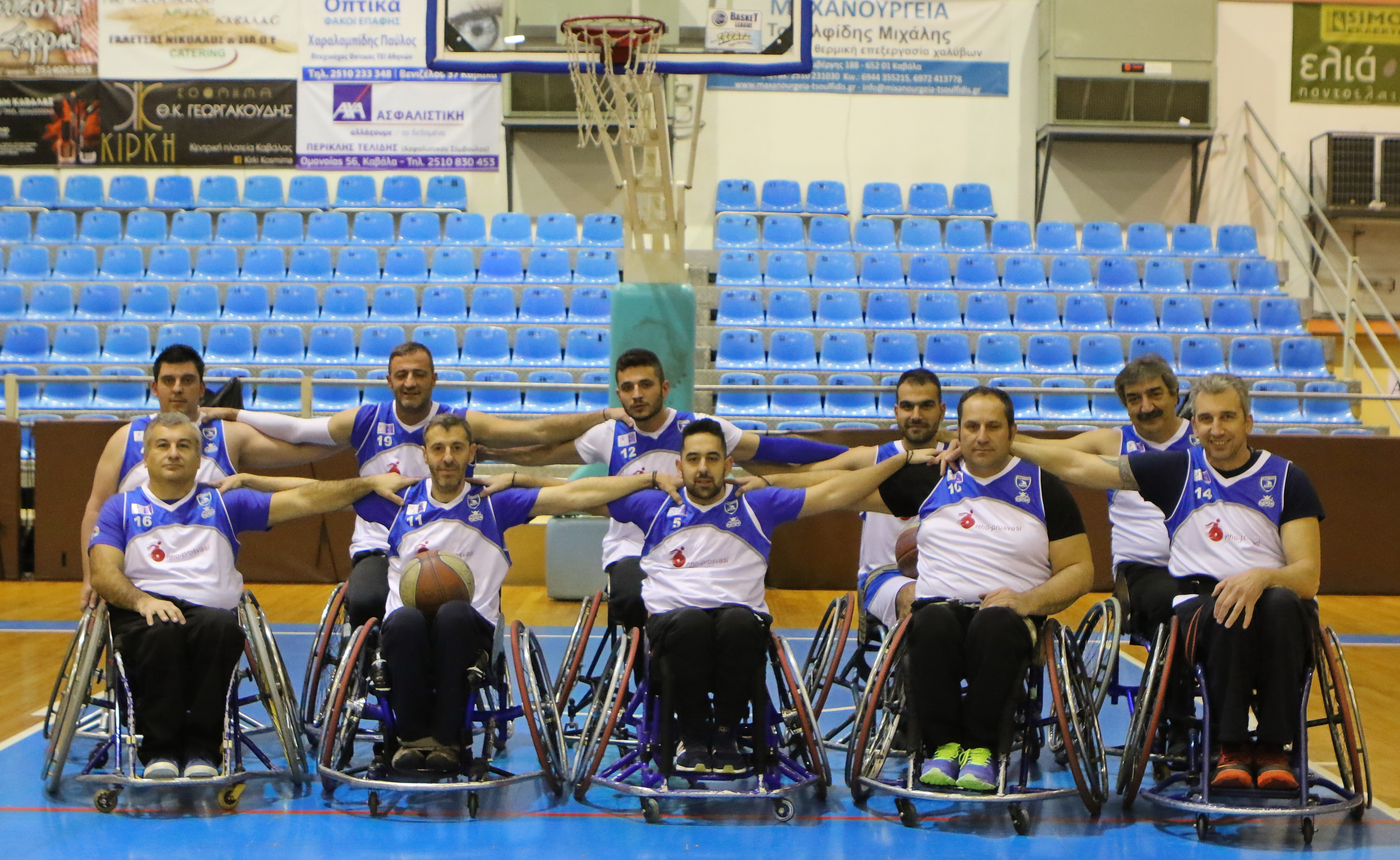 Η ομάδα καλαθοσφαίρισης το 2018-2019